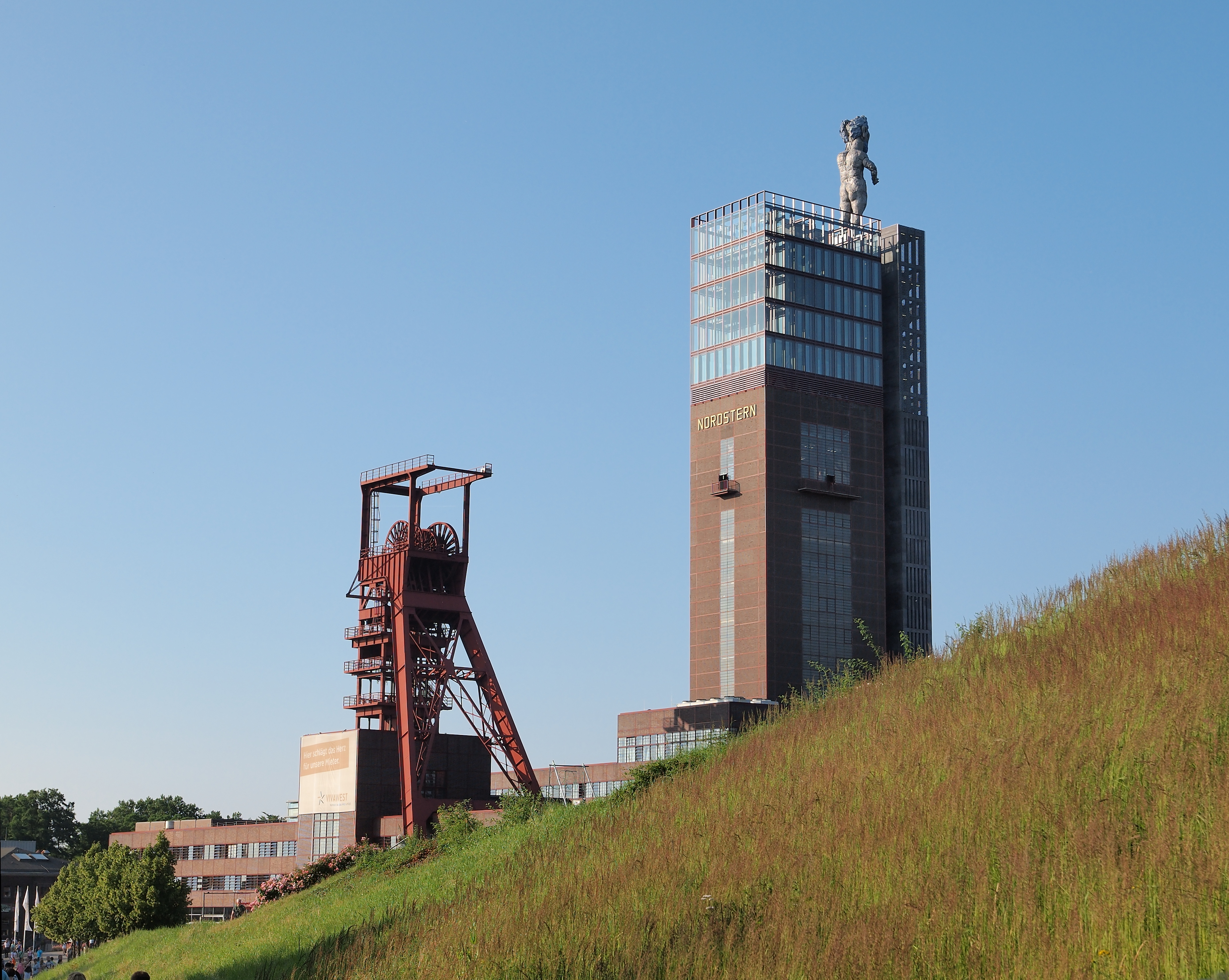 Zeche Nordstern, Gelsenkirchen, Förderturm von Schacht 2 mit Aufbau und Herkules von Markus Lüpertz